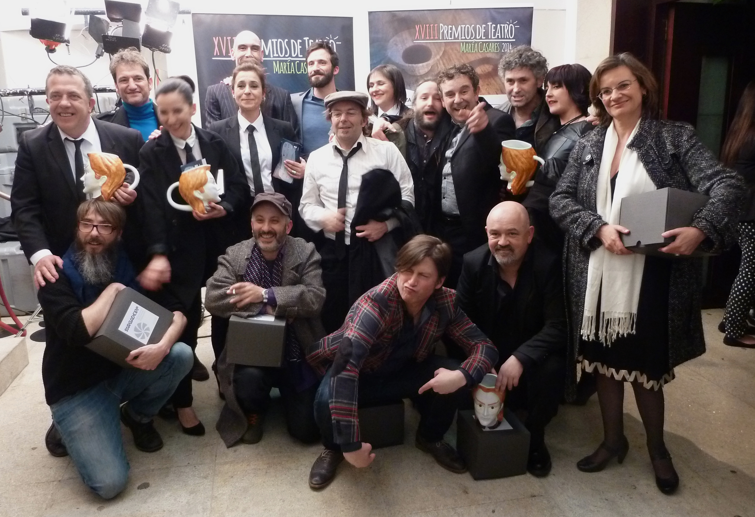 Algúns dos premiados nos María Casares 2014 na entrega de premios no teatro Rosalía de Castro da Coruña. De pé, atrás, de esq. a dta. : Pepe Penabade, Javier Domingo Ballestín (premio mellor escenografía), Fidel Vázquez (mellor iluminación), Iván Marcos, Patricia de Lorenzo (mellor actriz secundaria), Borja Fernández, Miguel de Lira, Cándido Pazó (mellor texto orixinal) Trini F.Silva (mellor maquillaxe), Cristina Domínguez (mellor dirección), De pé, diante Arantxa Villar, Mónica García e Xesús Ron. Agachados: Hugo Torres, Josito Porto (mellor actor protagonista), Carlos Mosquera “Mos” (mellor música orixinal), e César Goldi (mellor actor secundario).